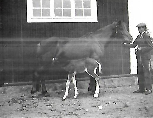 Jan-Erik hevosten kasvattajana 1936